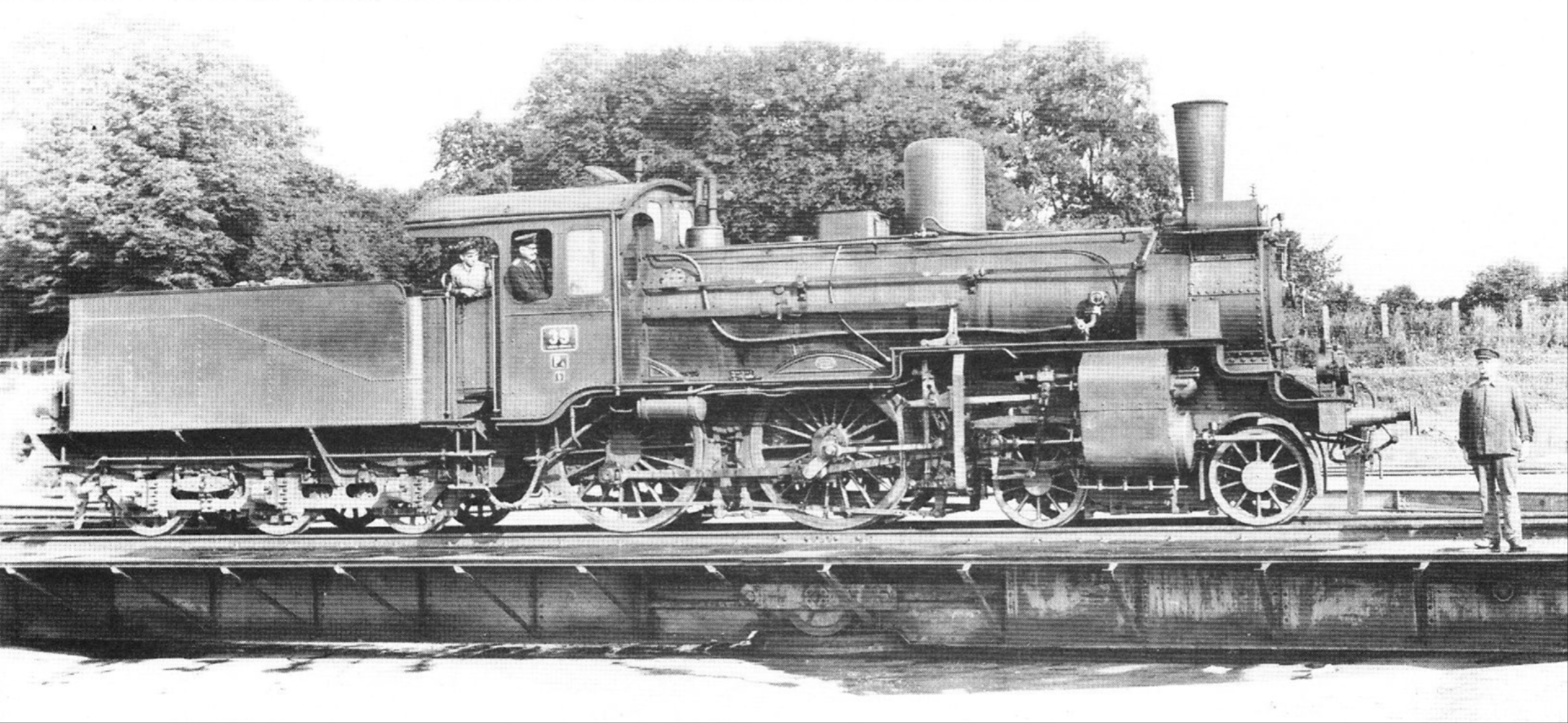 Damplokomotive der Bauart P 4 der Lübeck-Büchener Eisenbahn, Nr. 39